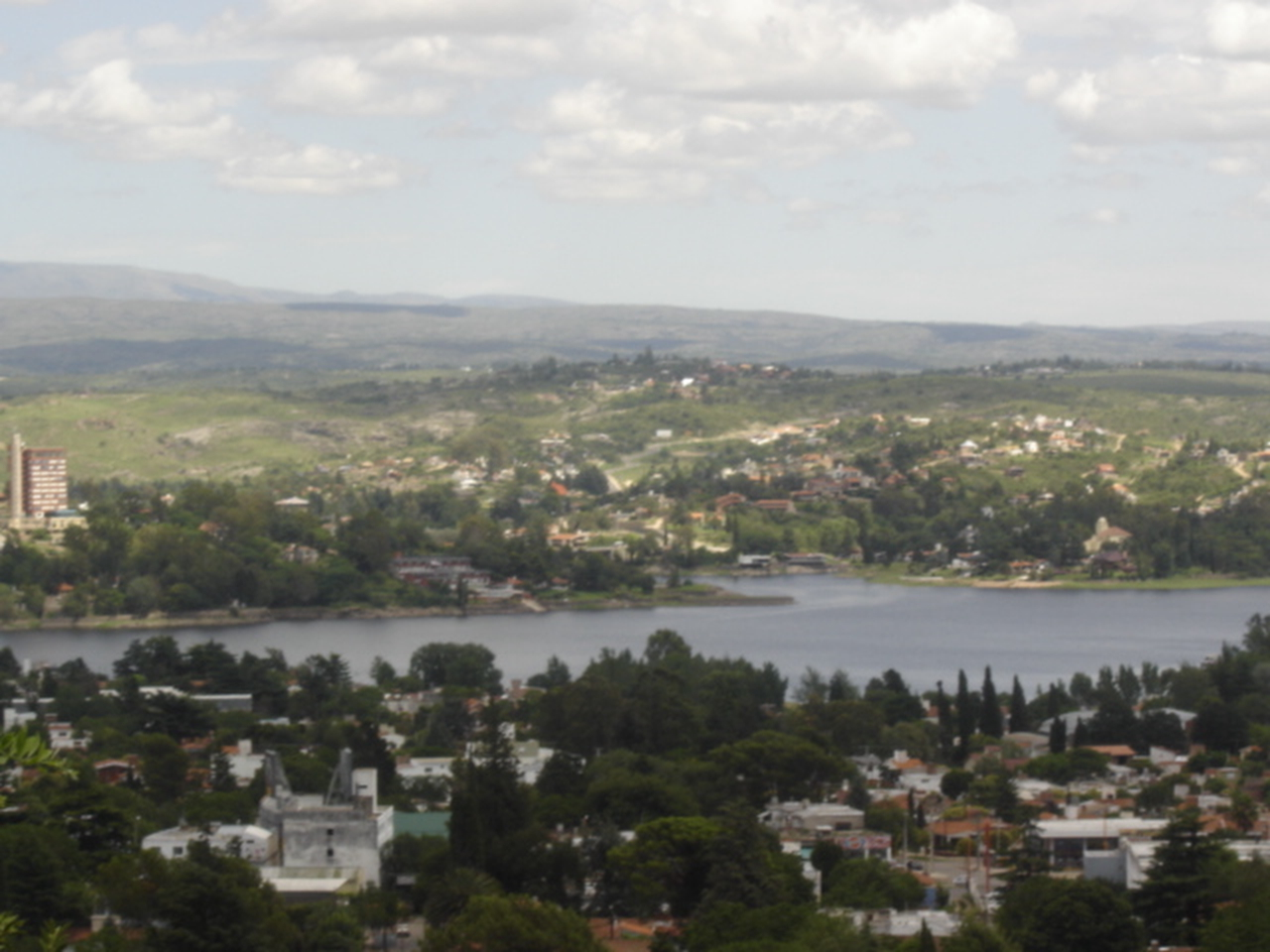 Vista de Villa Carlos Paz desde el Cerro de la Cruz. Dicha ciudad está ubicada en el Departamento Punilla, Provincia de Córdoba, Argentina.